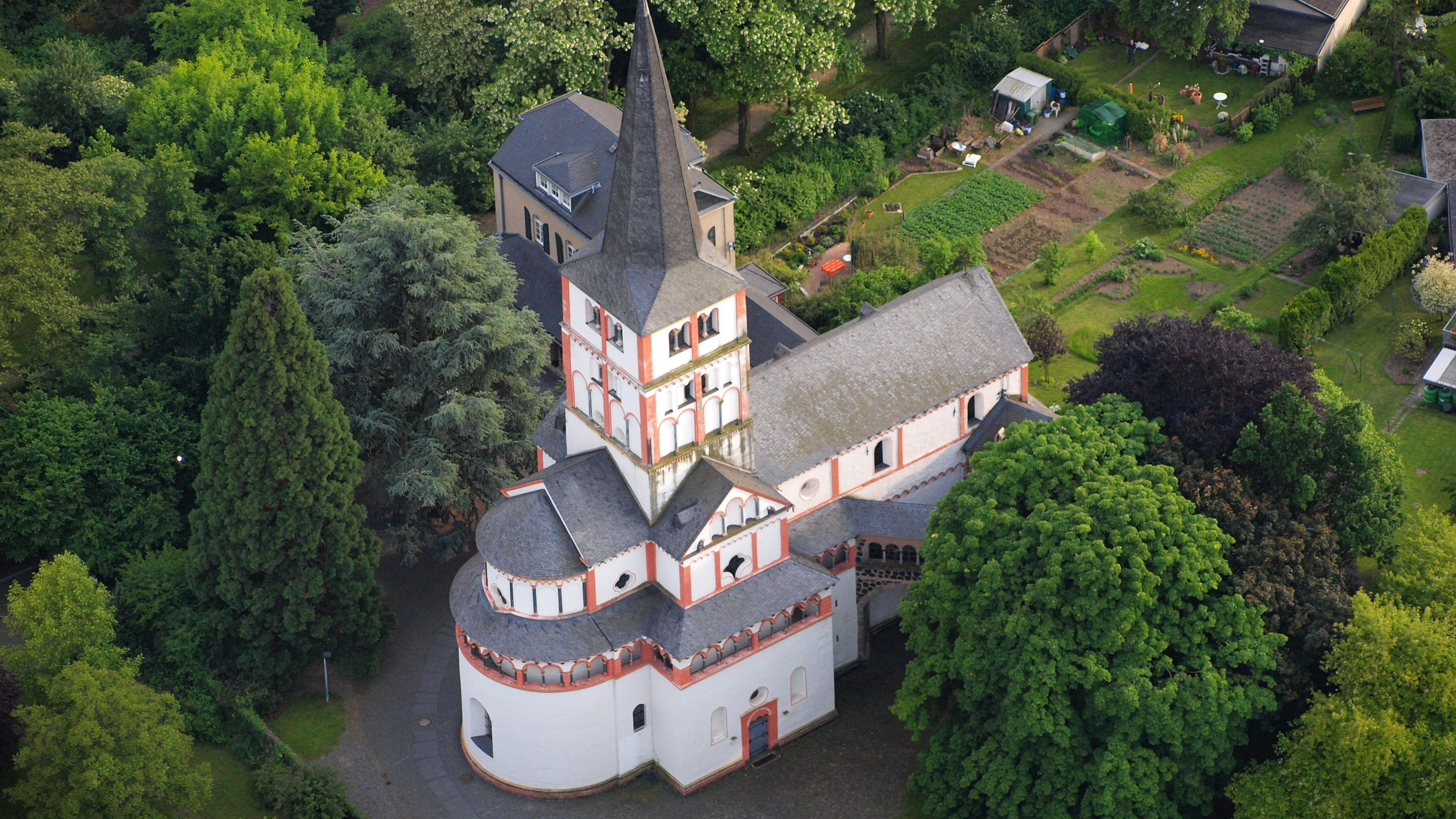 St. Maria und Clemens, Schwarzrheindorf: Luftaufnahme